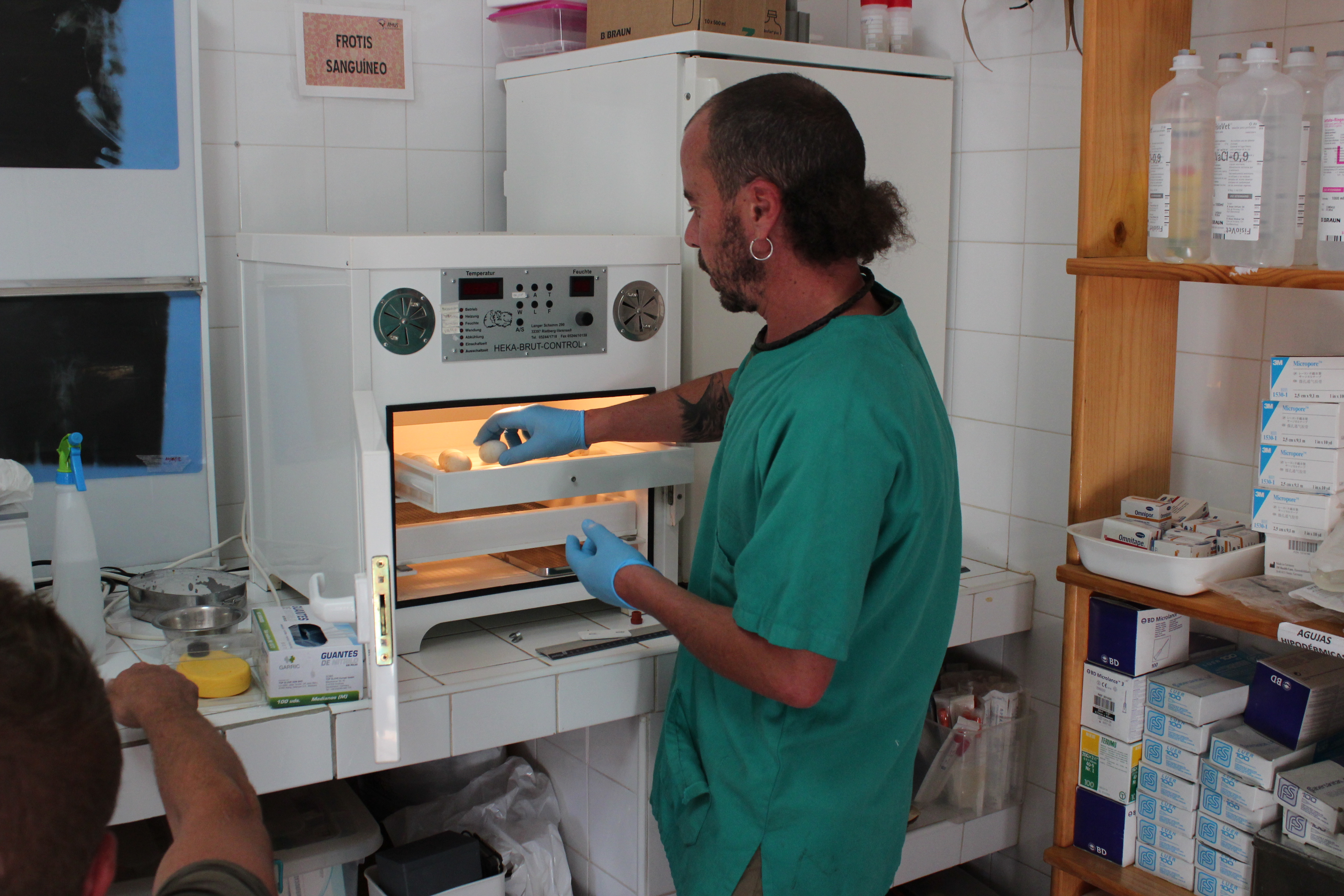 Incubadora. En este caso, se están incubando huevos de aguilucho cenizo.